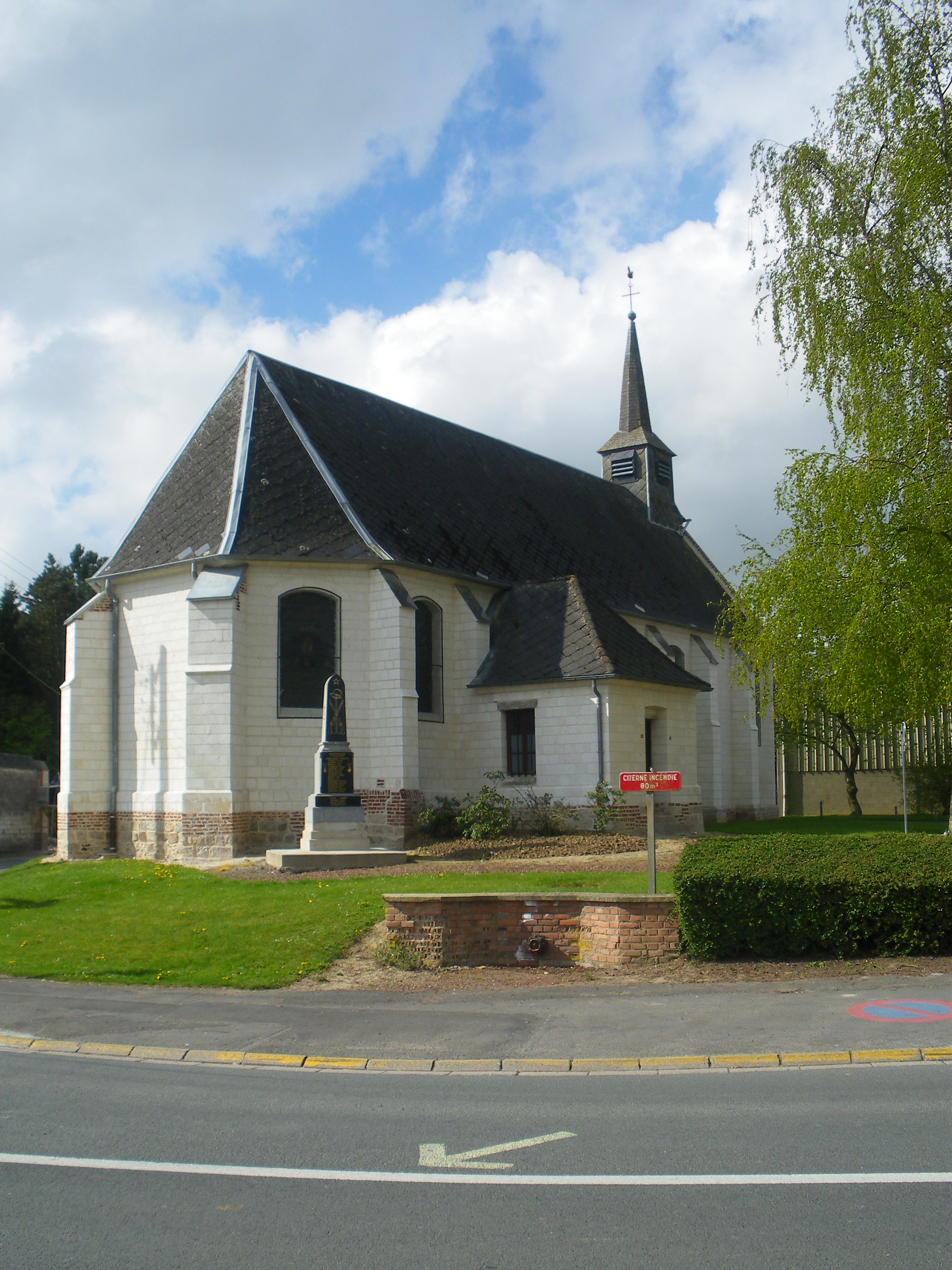 Vue d'e l'église Saint-Christophe et du monument aux morts de la commune de Hauteville (Pas-de-Calais).